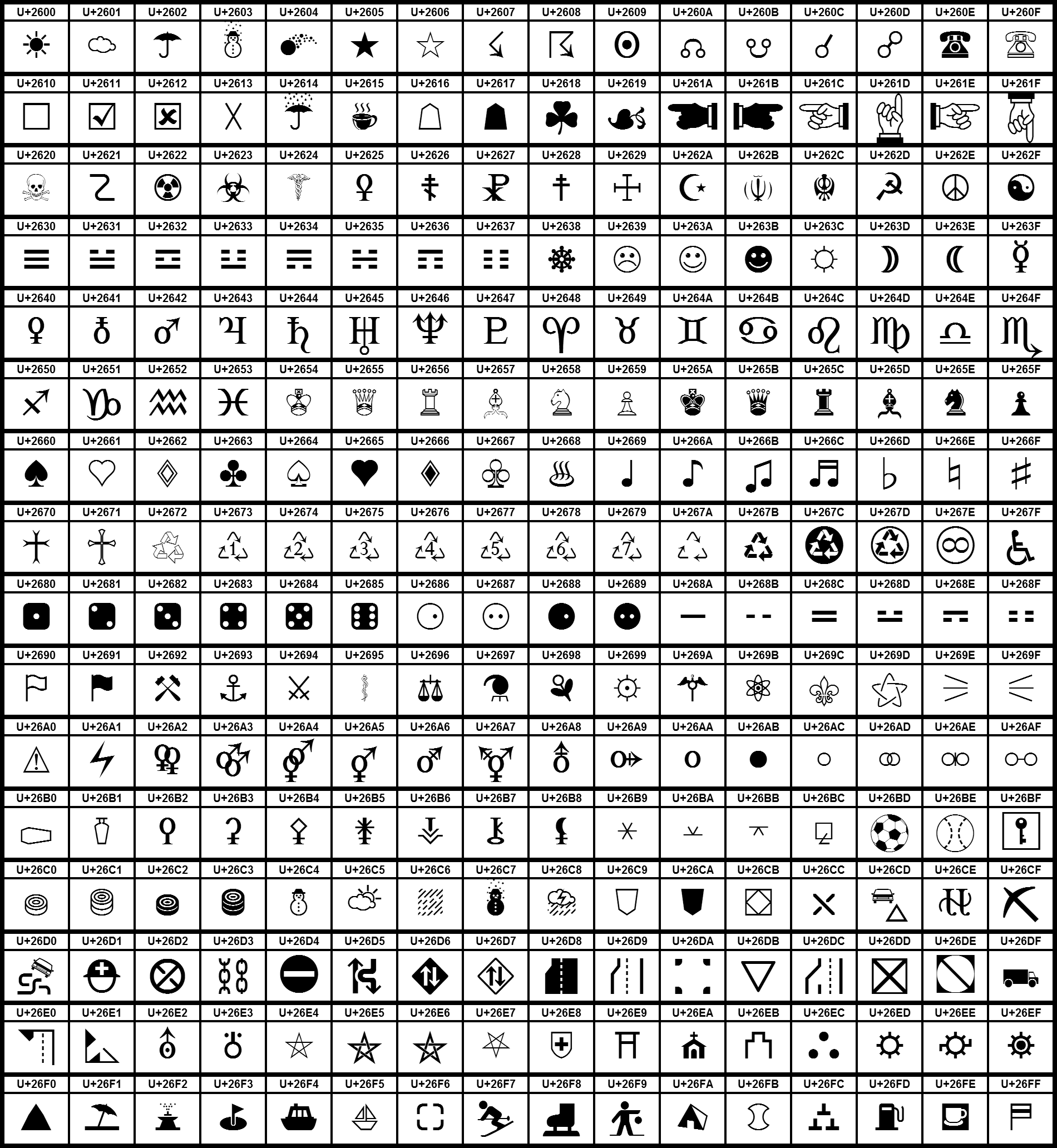 Grafiktafel für den Unicodeblock Verschiedene Symbole.